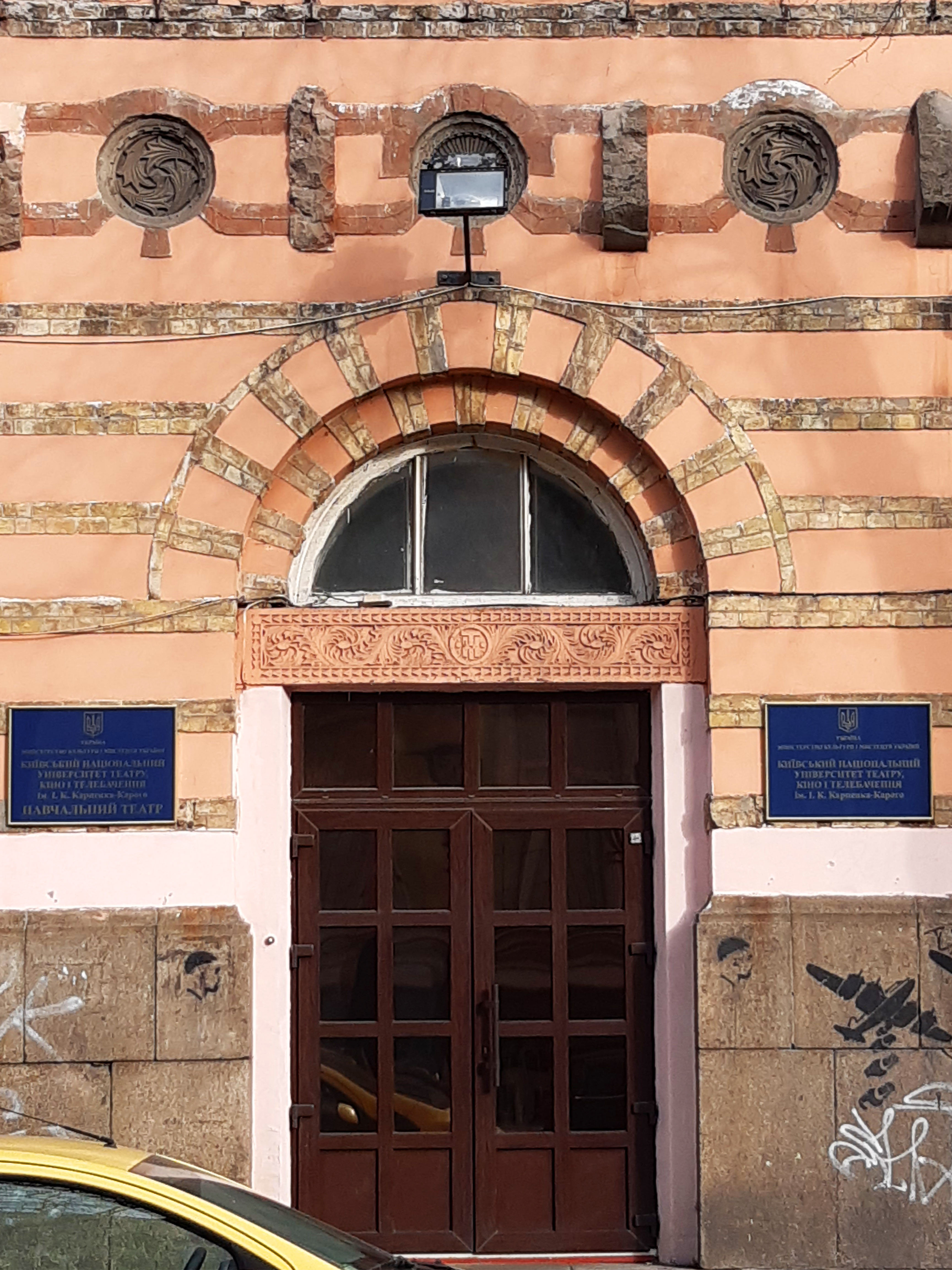 Вхід до будівлі колишнього Міського училища імені Ніколи Терещенка, Київ, вул. Ярославів Вал, 40